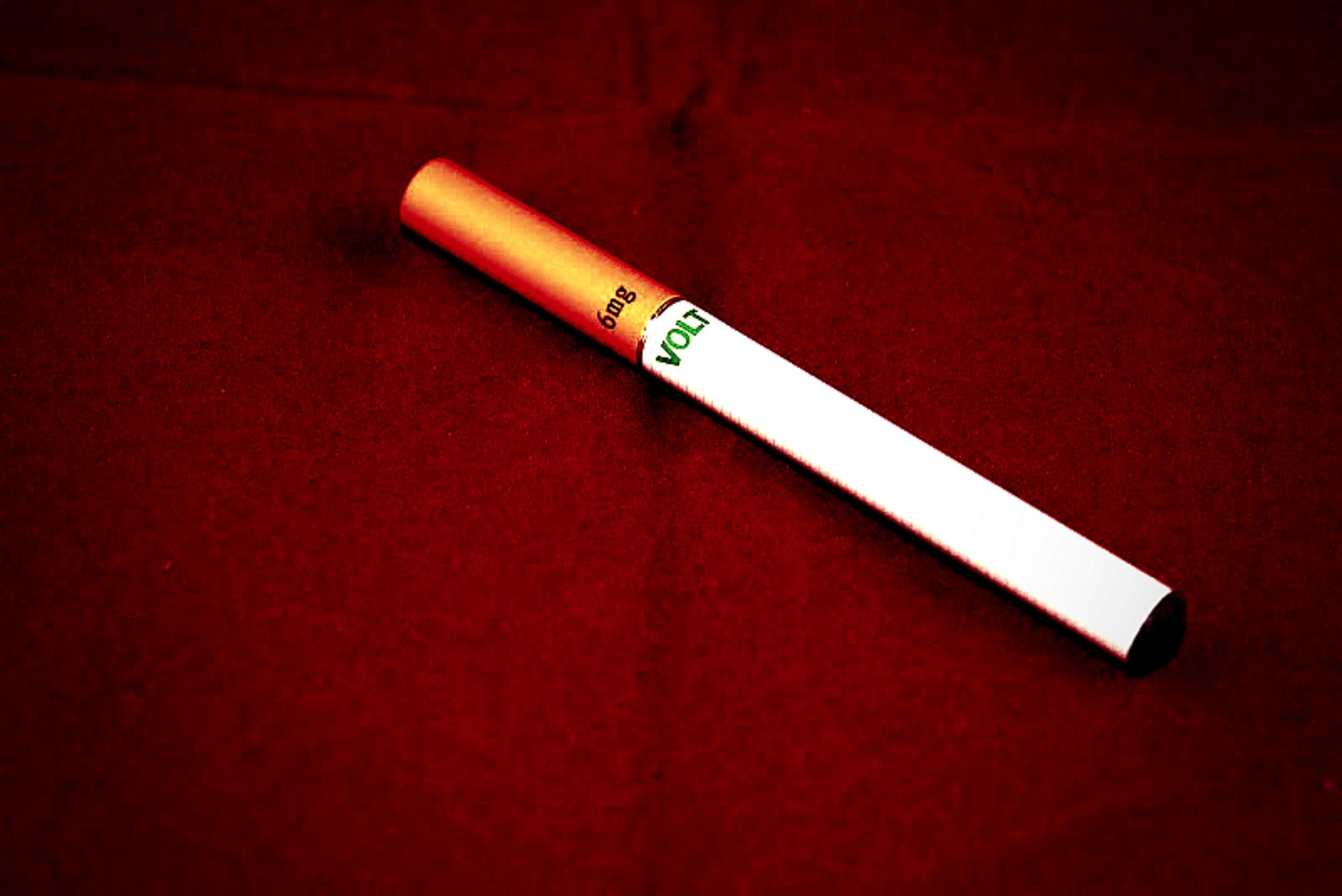 Cig a like